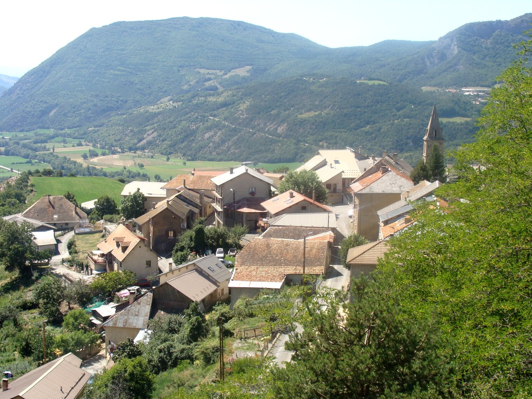 Vue d'ensemble du village d'Avançon (Hautes-Alpes)